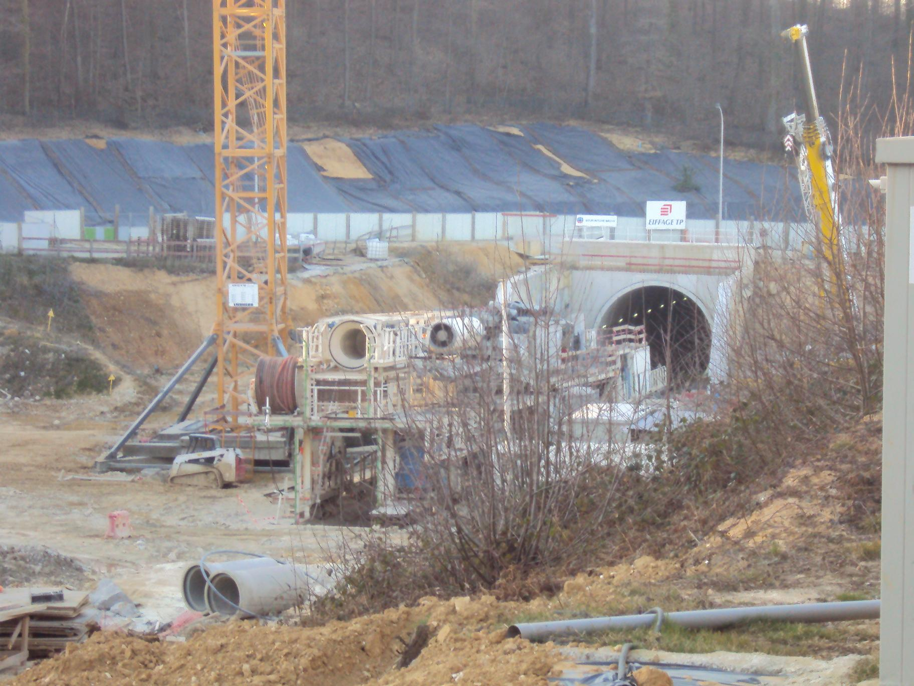 Travaux du T6 Vélizy